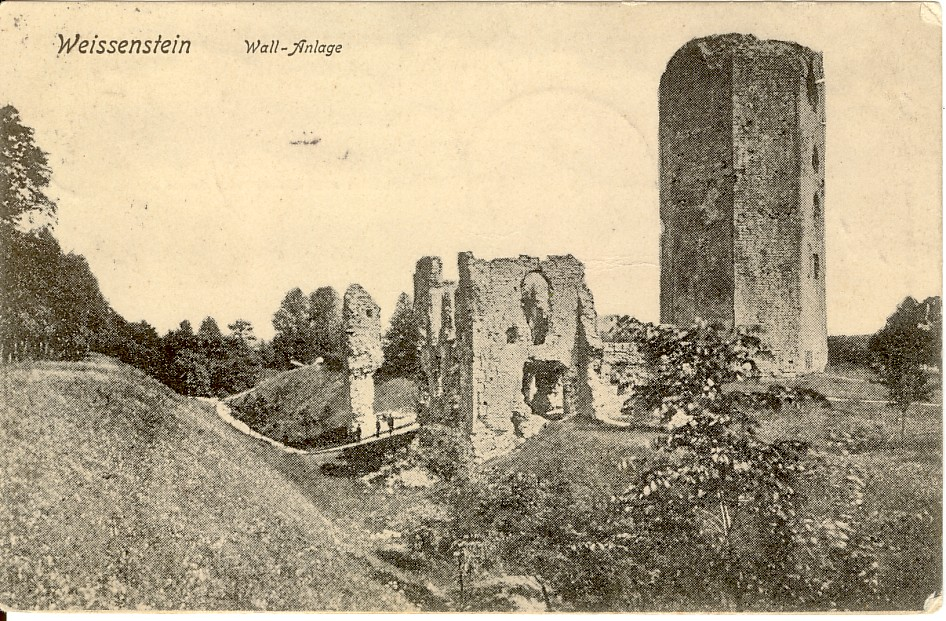 Muuseumikogu FotokoguOlemusvaremedOriginaaloriginaalSäilivusheaEraldatavad osadTehnika: must-valge foto. Materjal: fotopaber. Mõõdud: foto formaat: 1.0 10 x 15 cmtekst objektilWeissenstein Wall-Anlagesisu kirjeldus Vaade Paide Vallitornile 19. saj. teisel poolel. Esiplaanil Läänevärava varemed. Taguküljele kirjutatud kiri Paidest Peterburgi 24.06.1905.a.